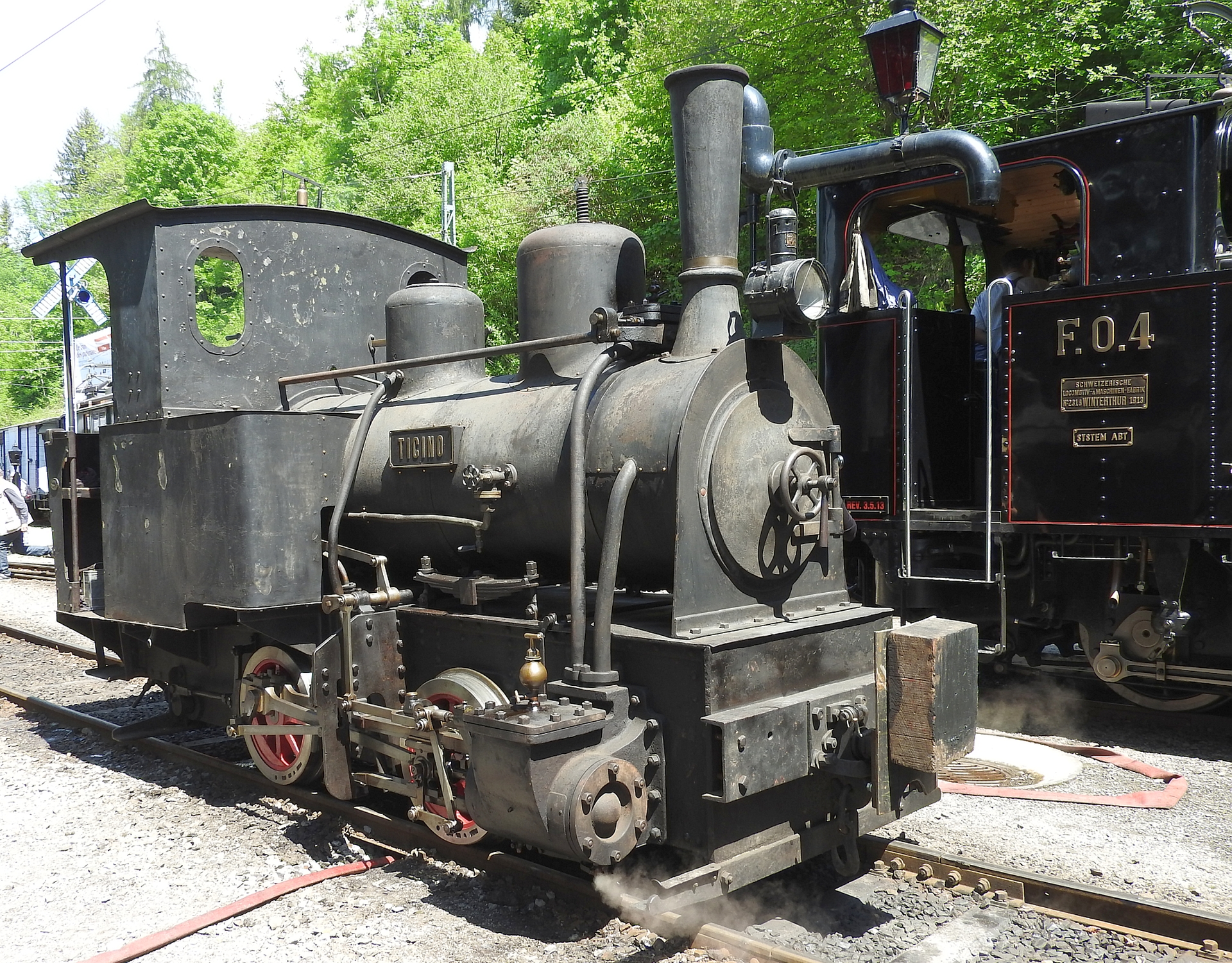 Ticino, 0-4-0T, (Jung 59/1889), Blonay, 12.5.2018